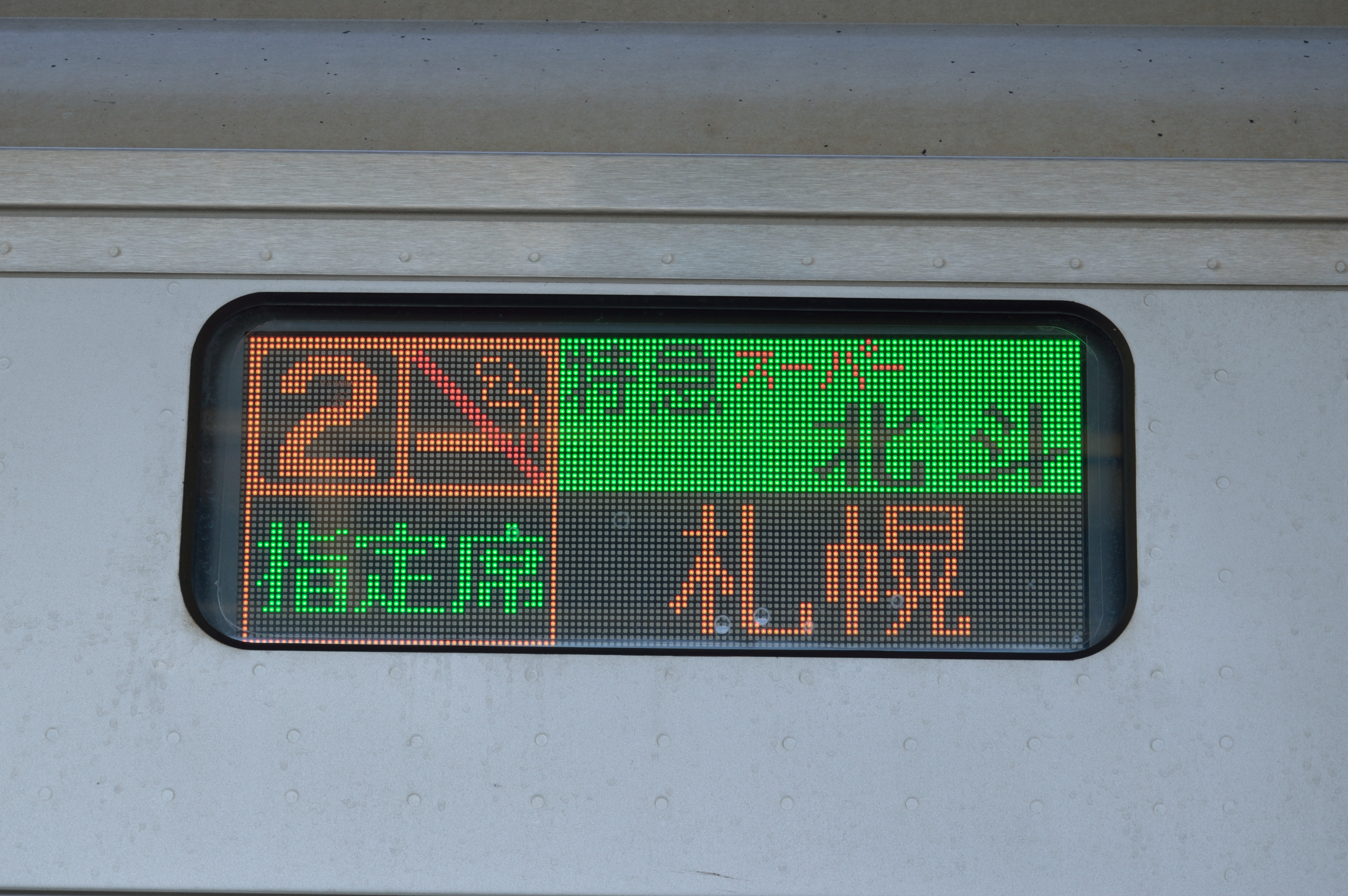 JR北海道キハ261系1000番台の側面行き先表示器。